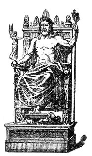 Posąg Zeusa w świątyni w Olimpii był zaliczany przez starożytnych Greków do cudów świata. Olbrzymi posąg siedzącego na tronie Zeusa dłuta Fidiasza został wykonany w chryzelefantynie po roku 430 p.n.e. Dotrwał jedynie do roku 426 n.e, a znany jest z rzymskiej kopii. Wykonany około 433 r.p.n.e. z drewna cedrowego, żelaza i gipsu, został ozdobiony złotem i kością słoniową. Ze złota wykonana była szata, włosy i broda boga. Ciało wymodelowano z głatkich płytek kości słoniowej, a oczy stanowiły dwa ogromne kamienie szlachetne wielkie jak pięść dorosłego mężczyzny. Posąg przedstawia Zeusa siedzącego w płaszczu na tronie i trzymającego w jednej ręce berło, a w drugiej posążek Nike. Podstawa posągu 6,5m x 1 m, wysokość ok. 13 m. Źródło: "